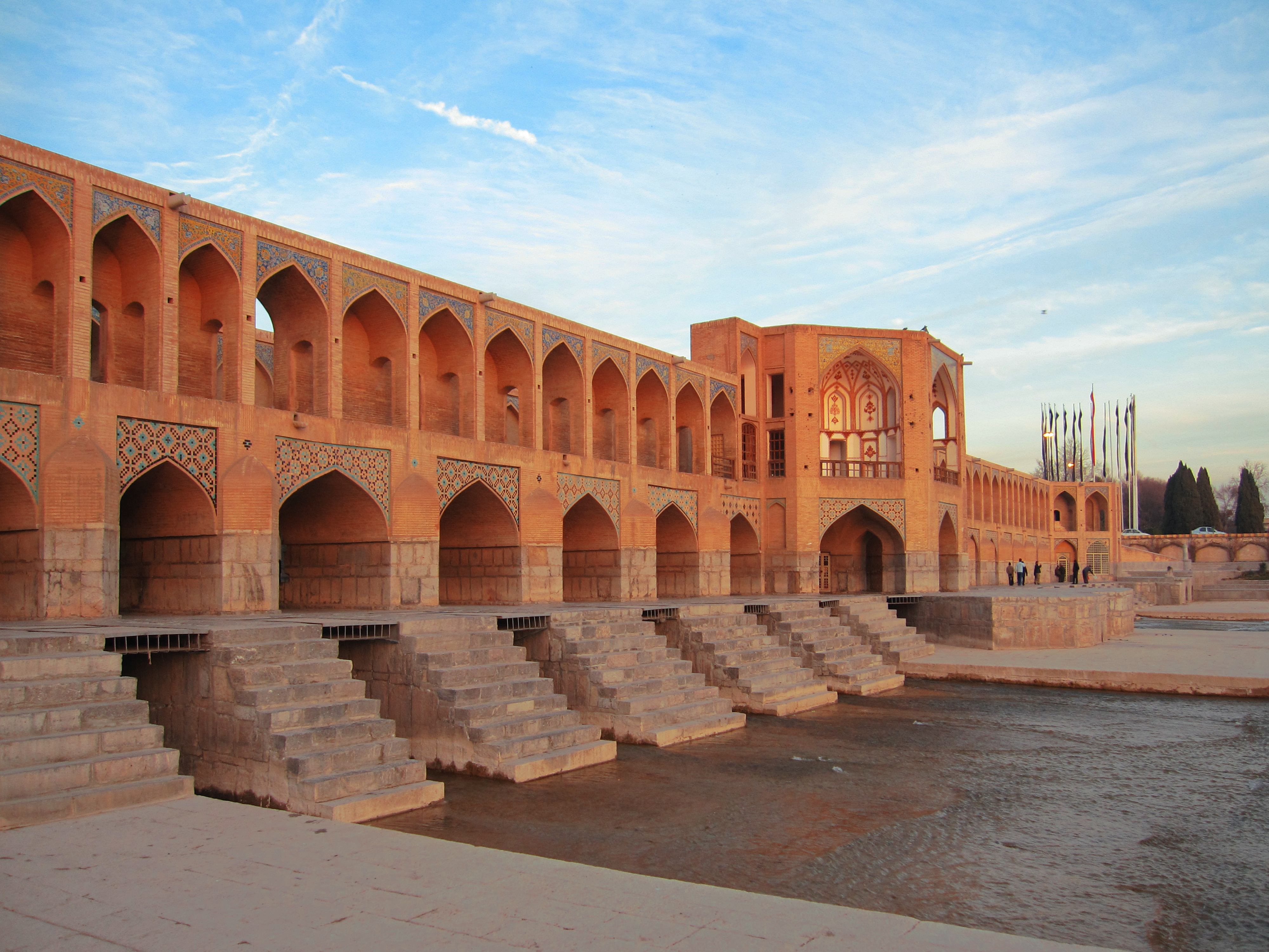 Khajoo Bridge, Isfahan, Iran